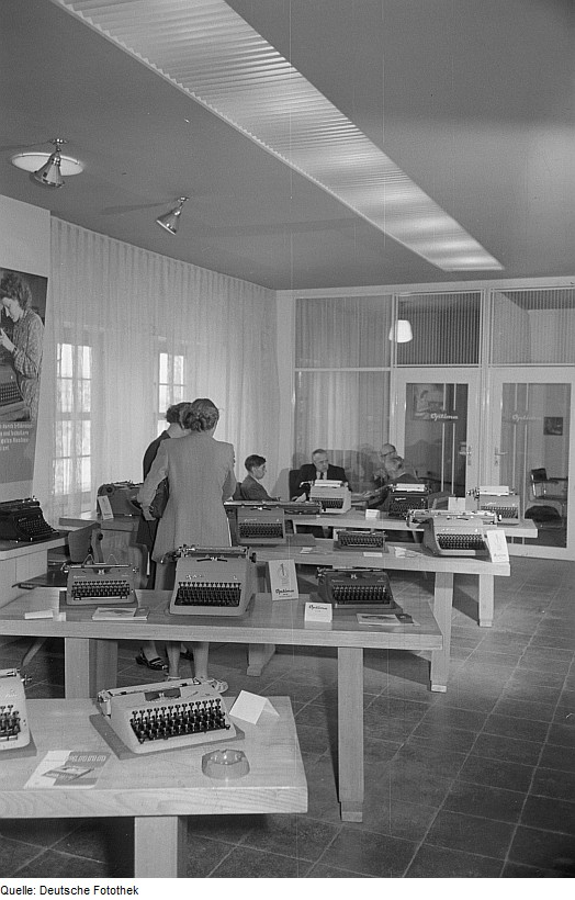 Original image description from the Deutsche Fotothek Besucher bei der Vorführung von Schreibmaschinen des VEB Optima Schreibmaschinenwerke Erfurt, Internationale Ausstellung für Buchgewerbe und Graphik (Bugra) 1953